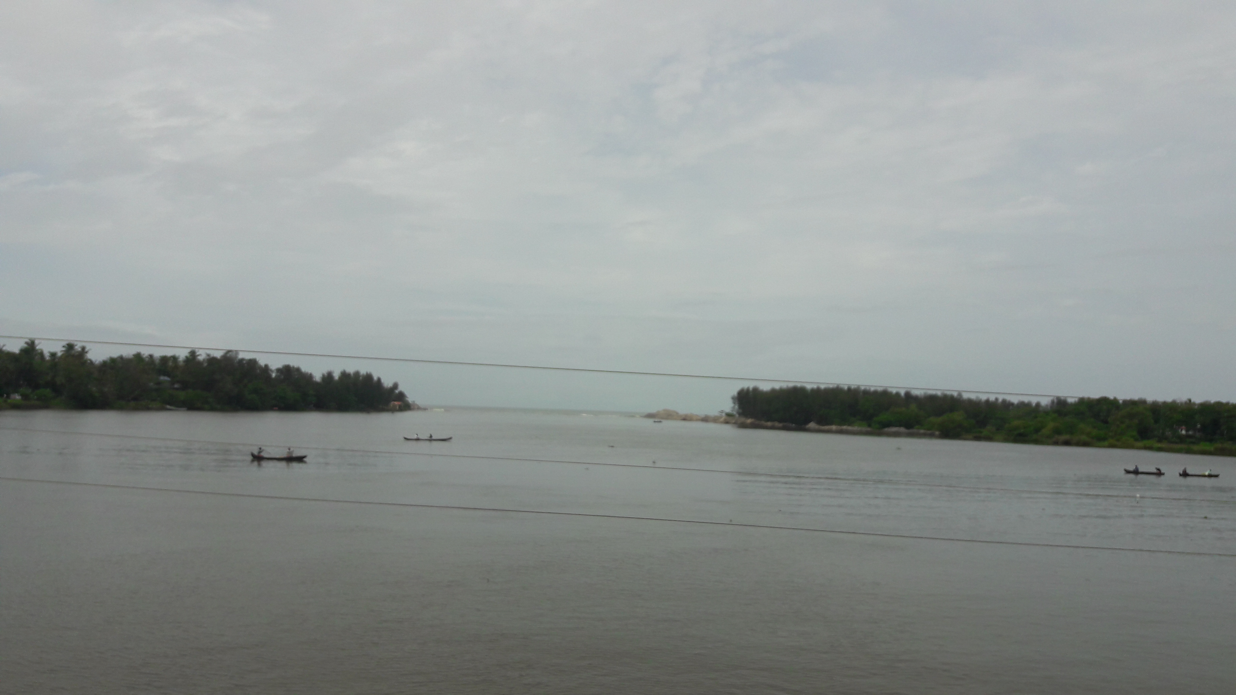 തോട്ടപ്പള്ളി സ്പിൽ വേയിൽ നിന്നു കടലിലേക്ക് ഒഴുകാനായി ബണ്ട് മുറിച്ചപ്പോൾ